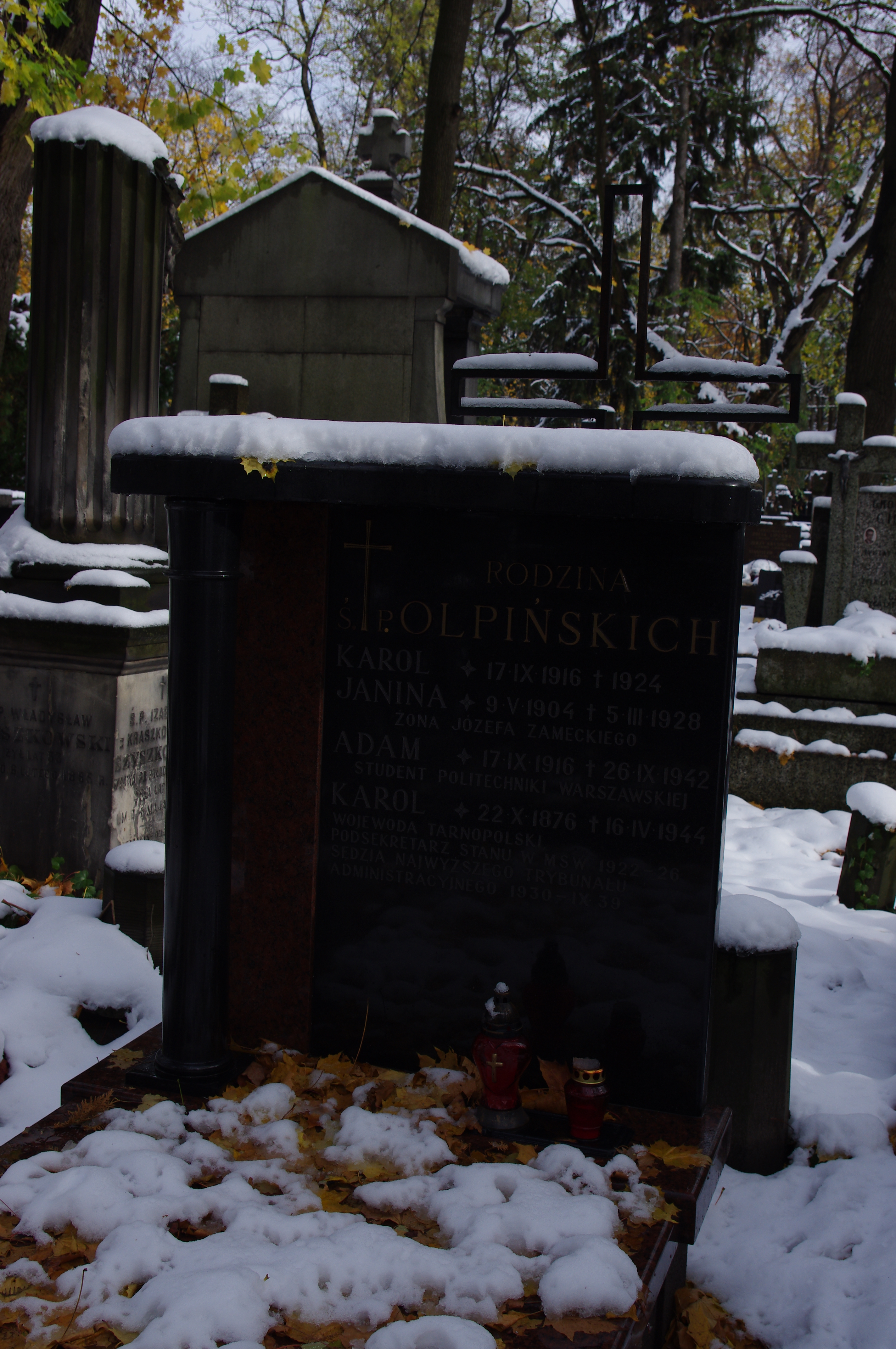 Grób wojewody tarnopolskiego i podsekretarza stanu w MSW - Karol Olpiński na Starych Powązkach w Warszawie